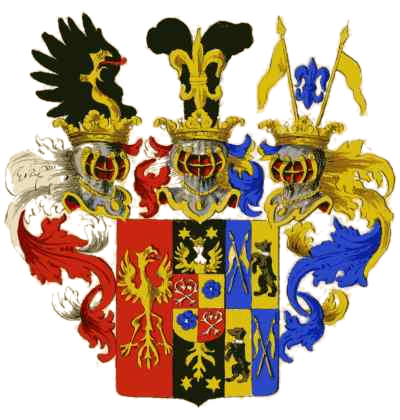 Wappen der Familie Kaunitz-Rietberg, Grafen von Rietberg. Das Wappen setzt sich zusammen aus dem goldenen Adler auf rotem Grund der Familie von Rietberg (links); dem Esenser Bären und den Wittmunder Peitschen für das Harlingerland (rechts); dem goldenen Jungfrauenadler auf schwarzem Grund der Familie Cirksena (Mitte); darüber als Herzschild das Wappen der Kaunitz, geviertelt, mit der Seerose der Kaunitz und der Rose der Sesyma-Austi.